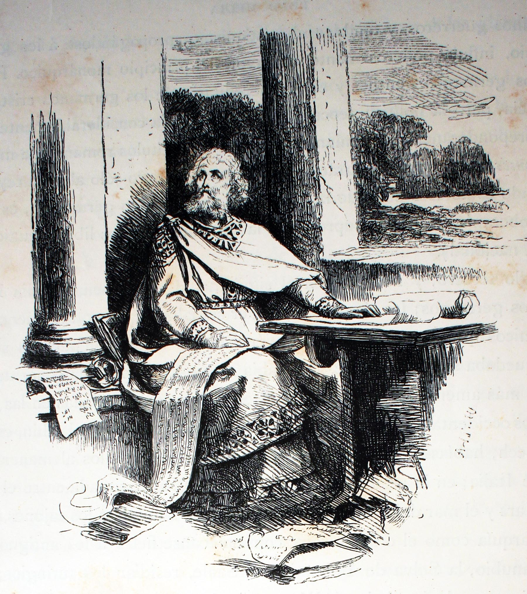 "Ulfila traduce la Biblia". Ilustraciones de la obra : Germania : dos mil años de historia alemana / por Juan Scherr. - Barcelona : Montaner y Simón, 1882.